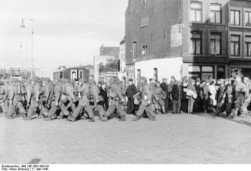 Deutsche Fallschirmjäger marschieren durch Maastricht. PK 637 11.5.40